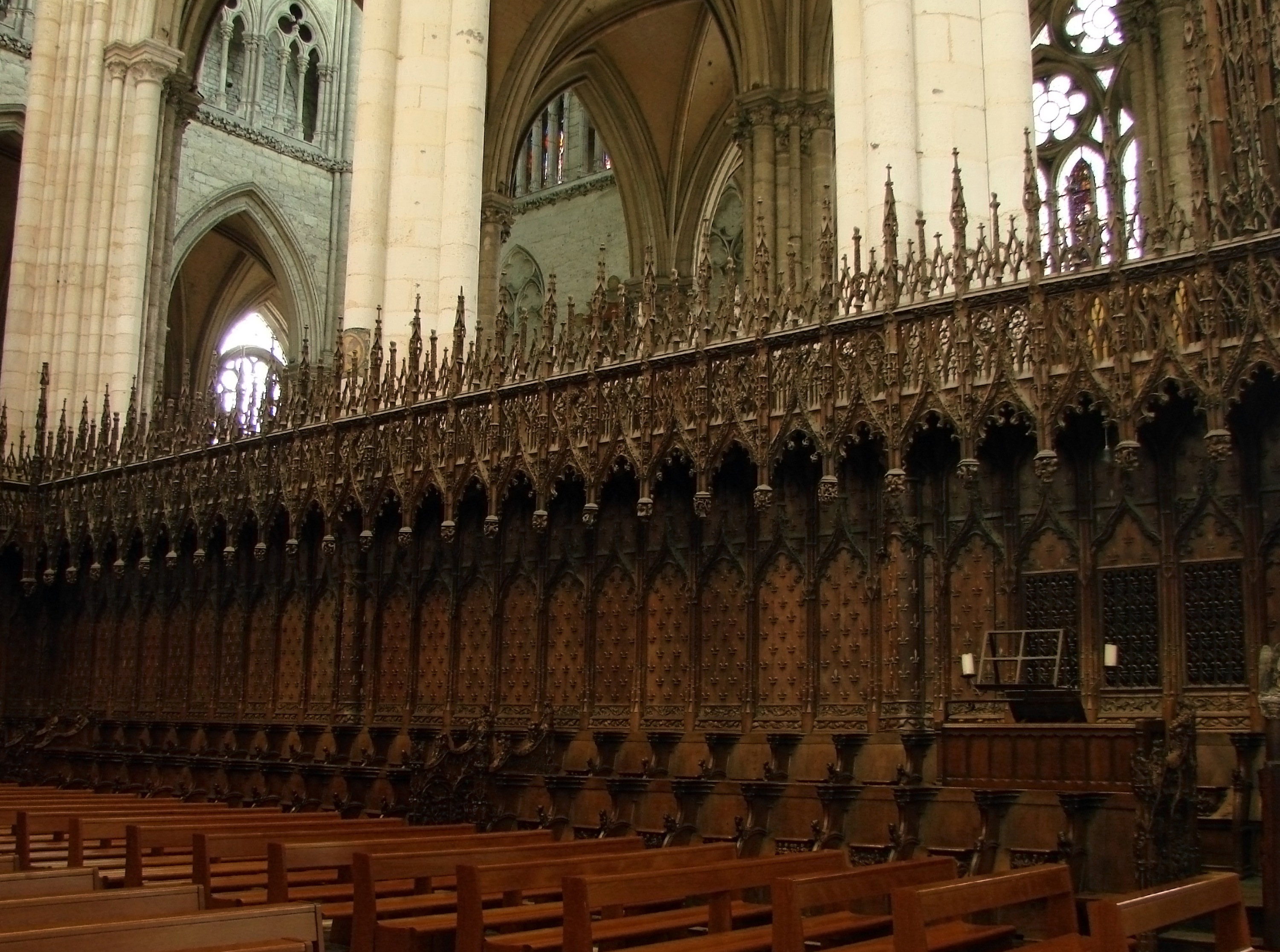 Stalles de la cathédrale Notre-Dame d'Amiens, 1508-1519.